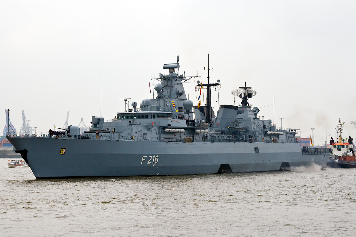 Die Fregatte Schleswig-Holstein (F 216) läuft in den Hamburger Hafen ein.